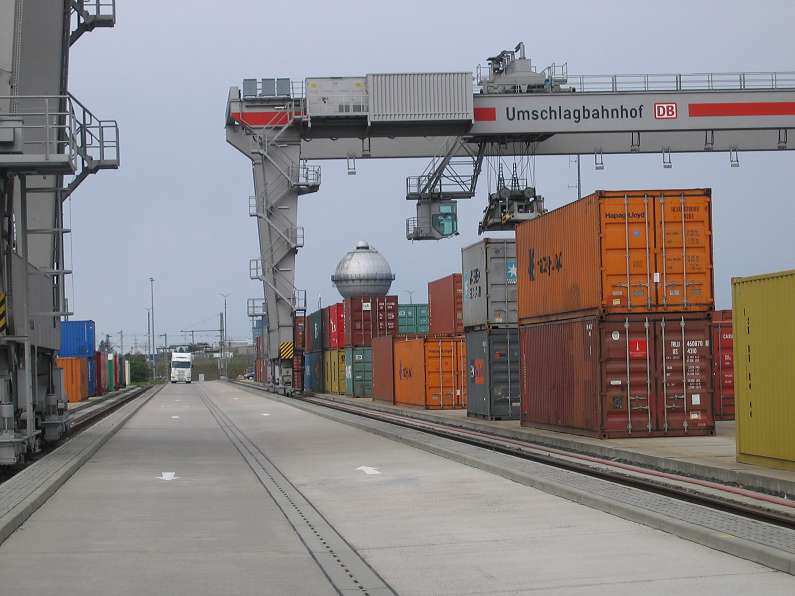 Portalkran auf dem Güterbahnhof Kornwestheim